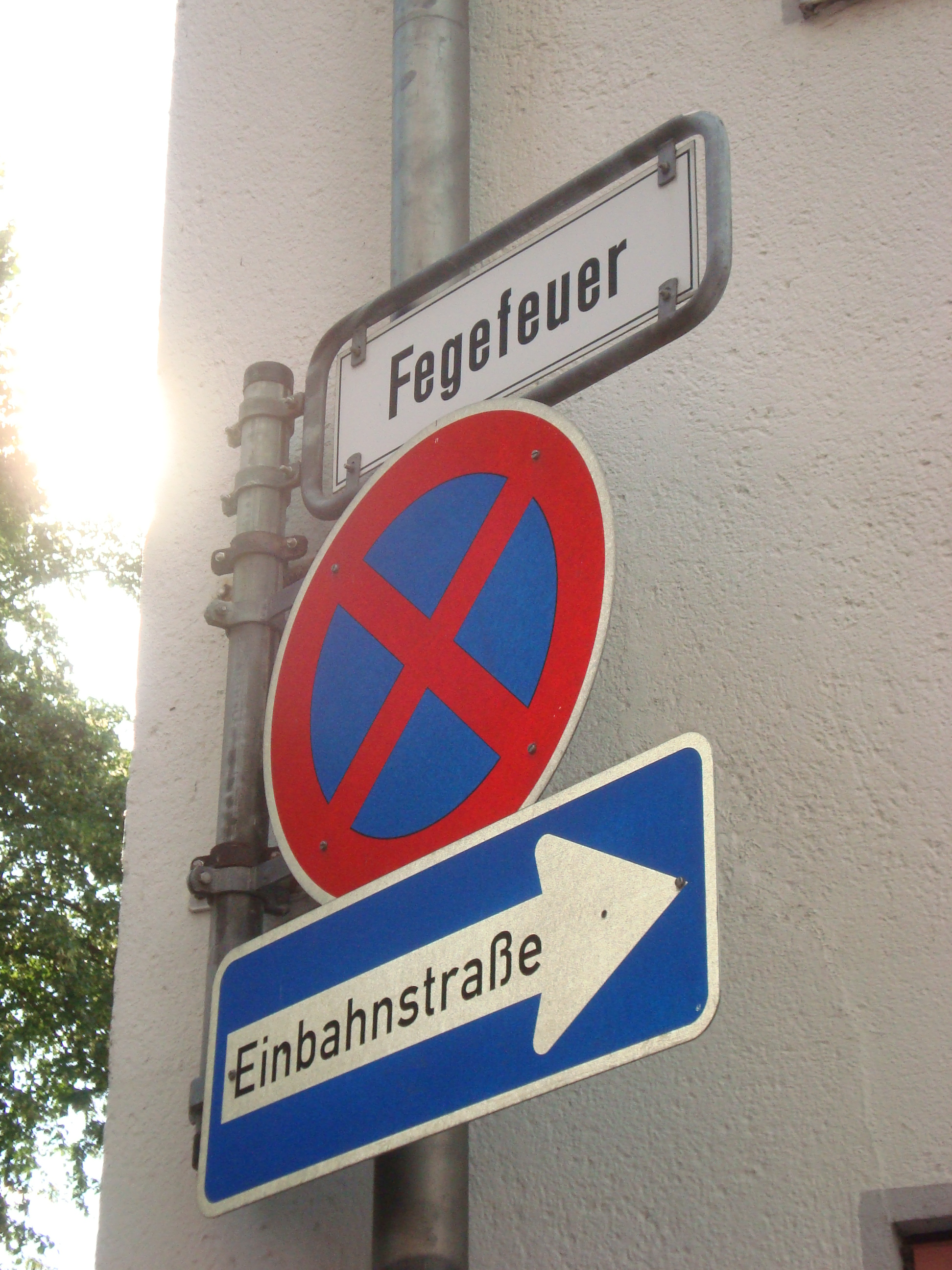 Straße "Fegefeuer" in Lübeck